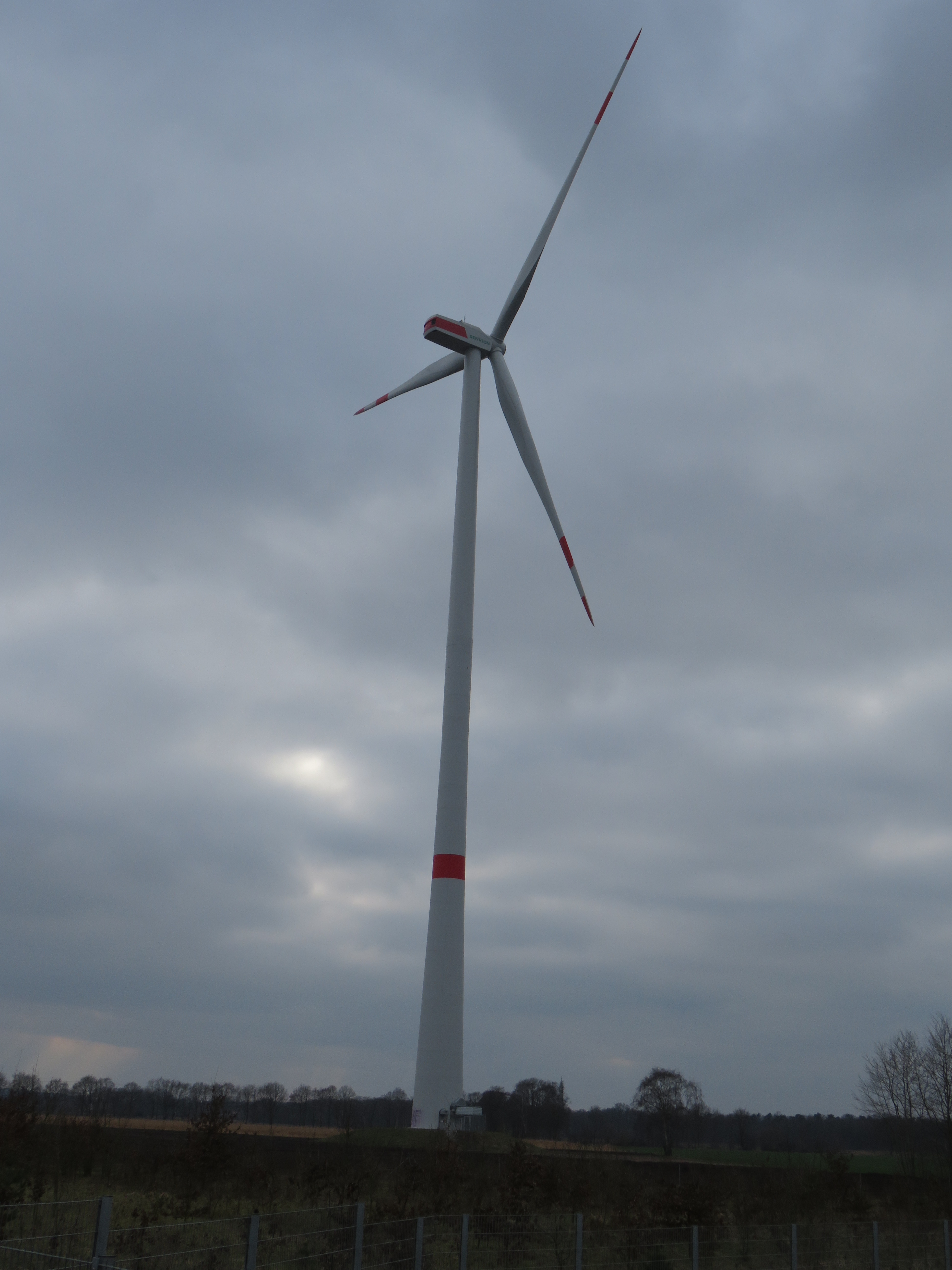 Windkraftanlage des Typs Senvion 3.2M122 mit 3,2 MW Nennleistung in Bramsche-Ahrensfeld (Landkreis Osnabrück, Niedersachsen). Bild aufgenommen vom Rastplatz Bramsche an der Bundesautobahn 1